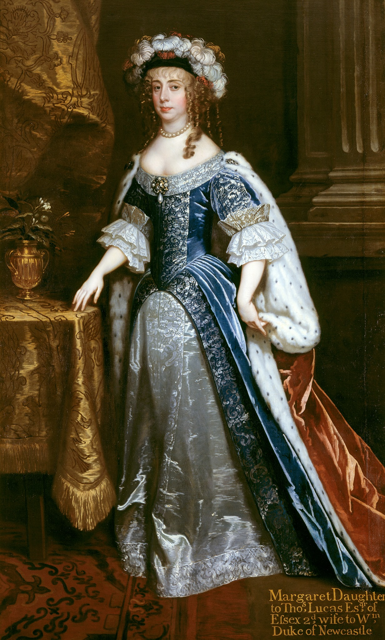 Portrait de Margaret Cavendish, duchesse de Newcastle, peint en 1665 par Peter Lely pour célébrer l'octroi du titre ducal à son mari par le roi Charles II.